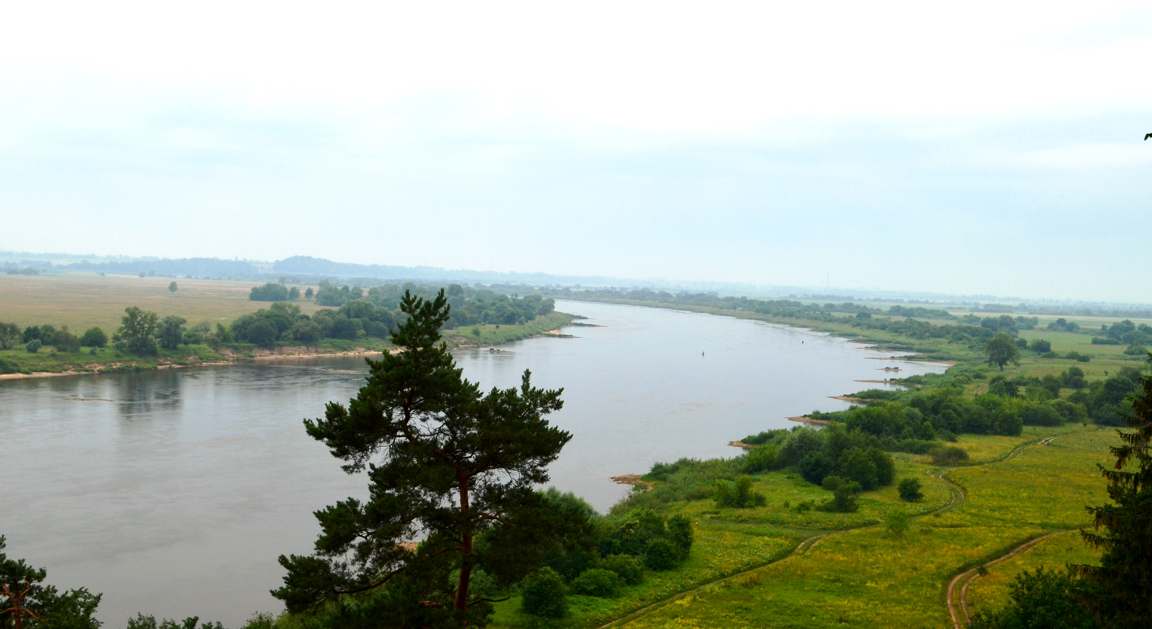 Nemunas žvelgiant nuo Rambyno kalno, Rambyno RP, Pagėgių sav.